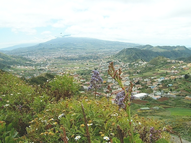 selbst erstellt am 20.4.05 Lizenz